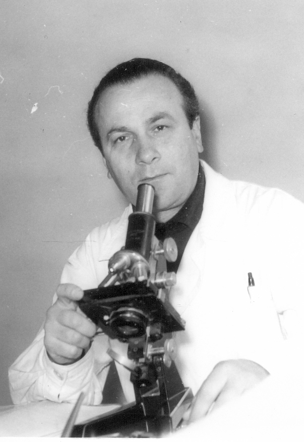 Prof Raychev - worked